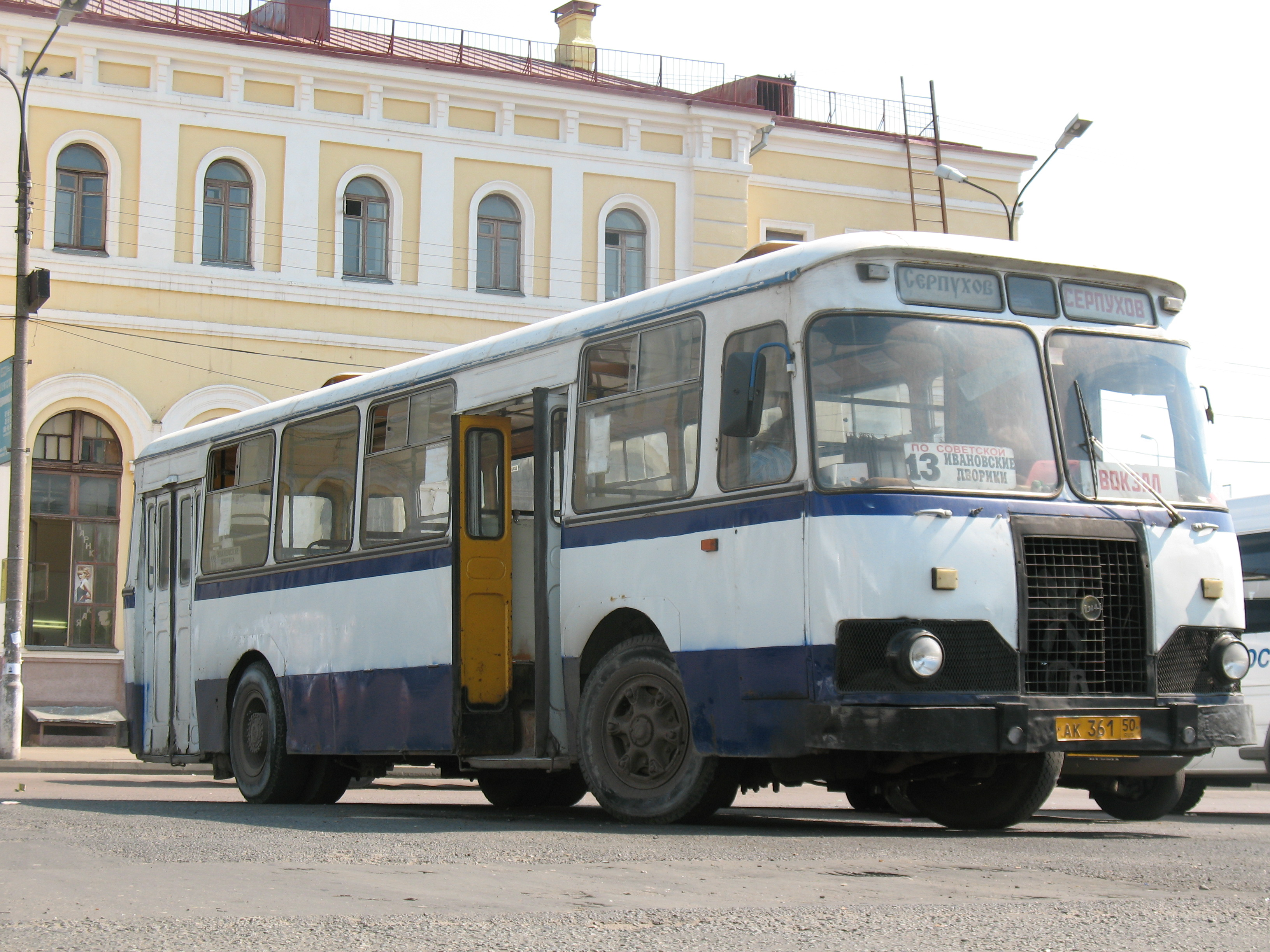 Серпухов, автобус ЛиАЗ-677М